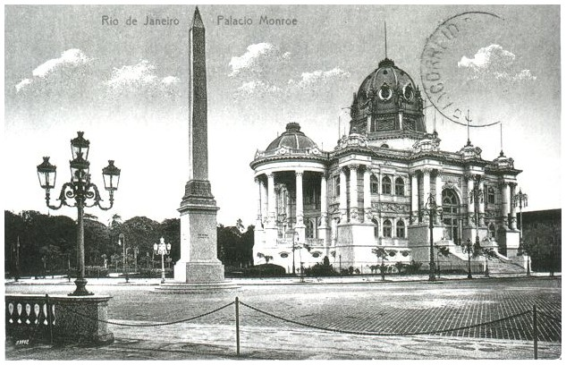 O Palácio Monroe num cartão-postal anterior a 1930.